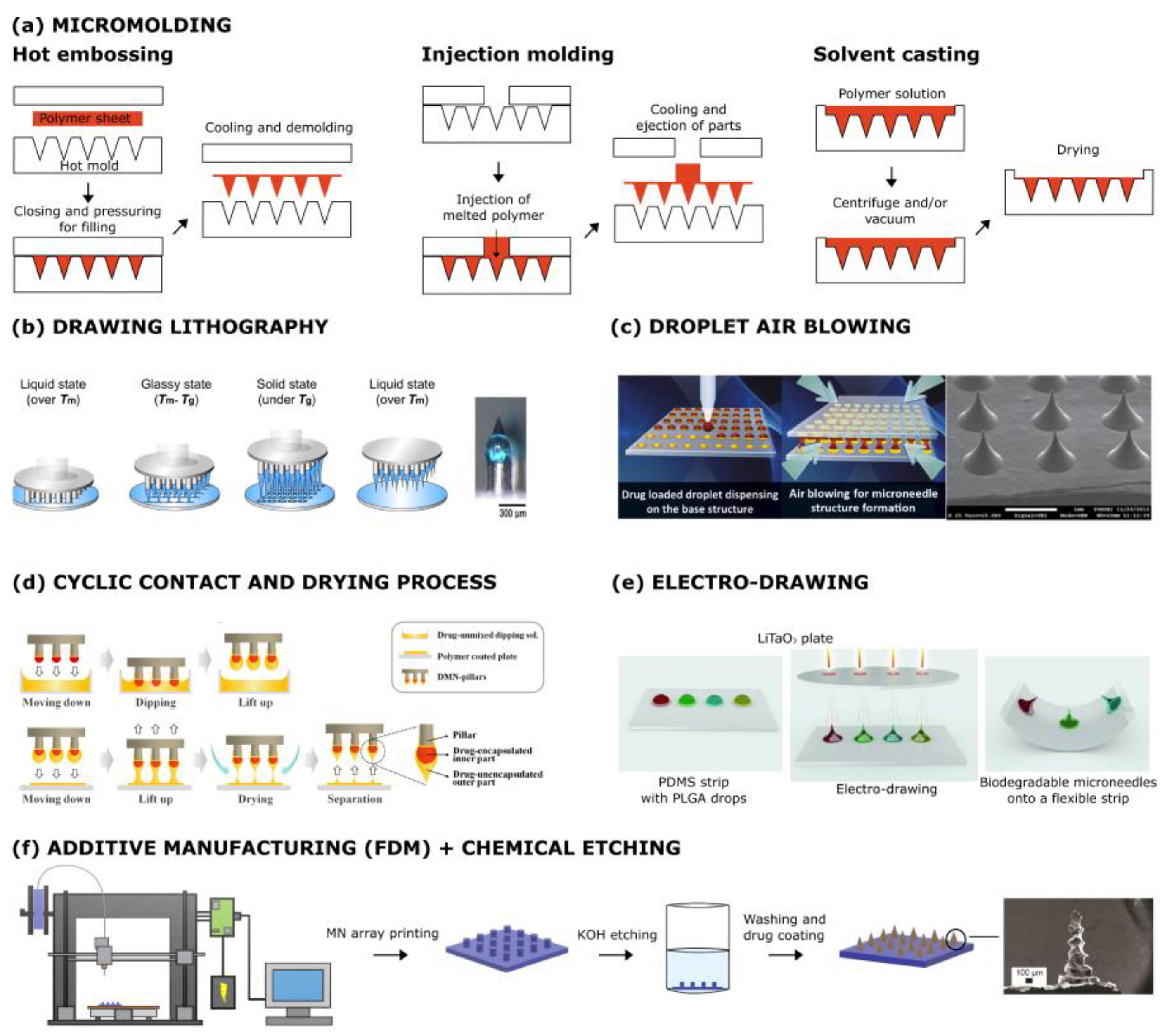 Методы изготовления микроигл. (а) Микролитье (micromolding): предварительно изготовленные молды могут быть заполнены полимерами путем горячего литья, литья под давлением или solvent-casting методом (b) Полимерная литография (с) Низкотемпературное выращивание микроигл из капель полимера. (d) Модификация выращивания микроигл из капель, циклическим погружением в раствор и удалением растворителя (e) Электроформовка микроигл на основе пироэлектрического эффекта диэлектрического кристалла (танталат лития, LiTaO3), (f) FDM – печать биоразлагаемых полимерных микроигл с последующей постобработкой для уменьшения размера и заострения кончиков микроигл.